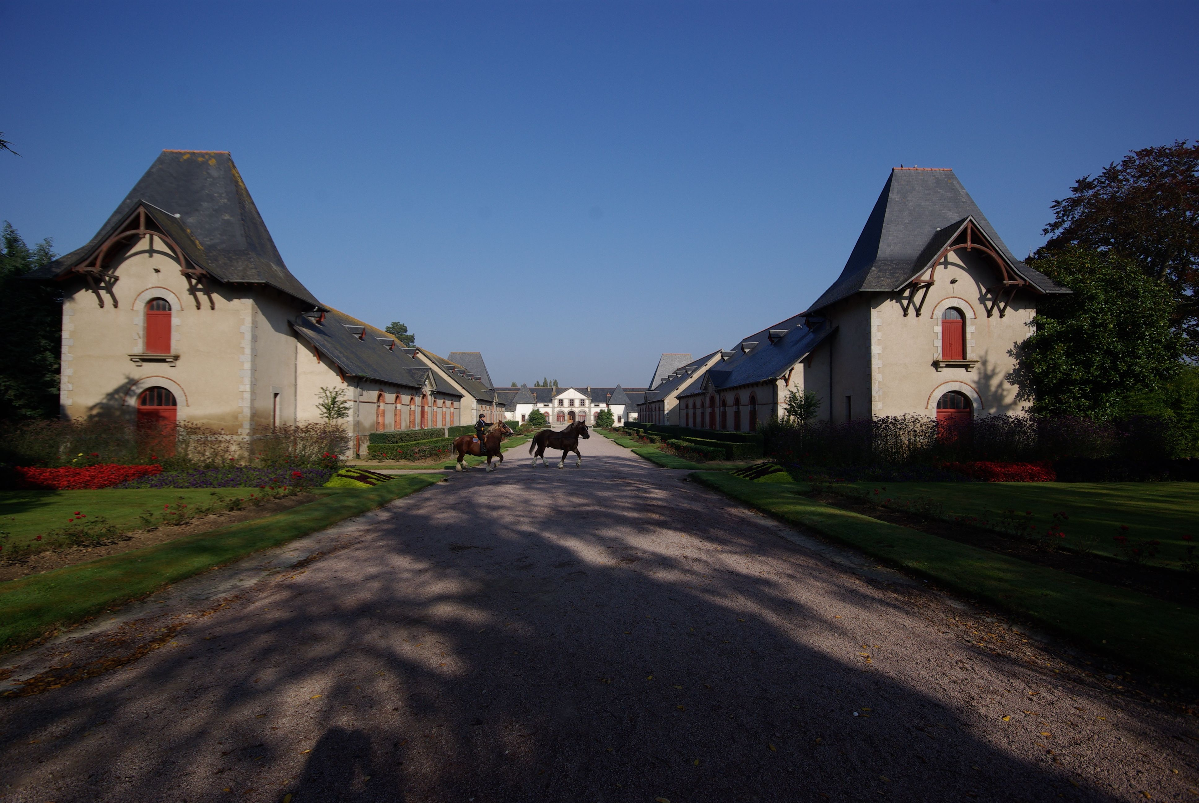 Lamballe in der Bretagne, Frankreich. Blick in das Gestüt in Lamballe (geotags in den EXIF-Daten).